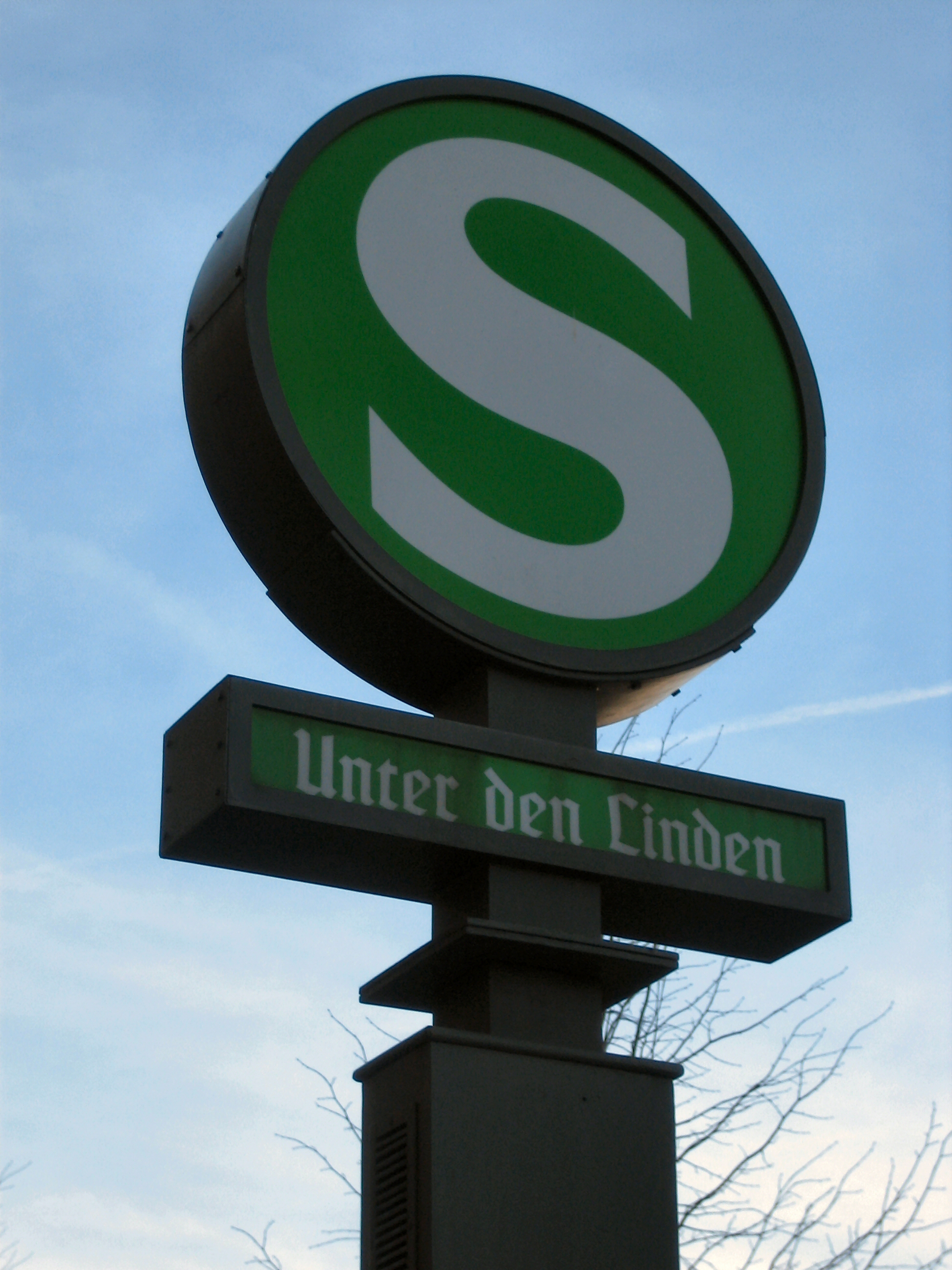 S bahn sign Unter den Linden Berlin - germany Picture taken by Hullie February 2007